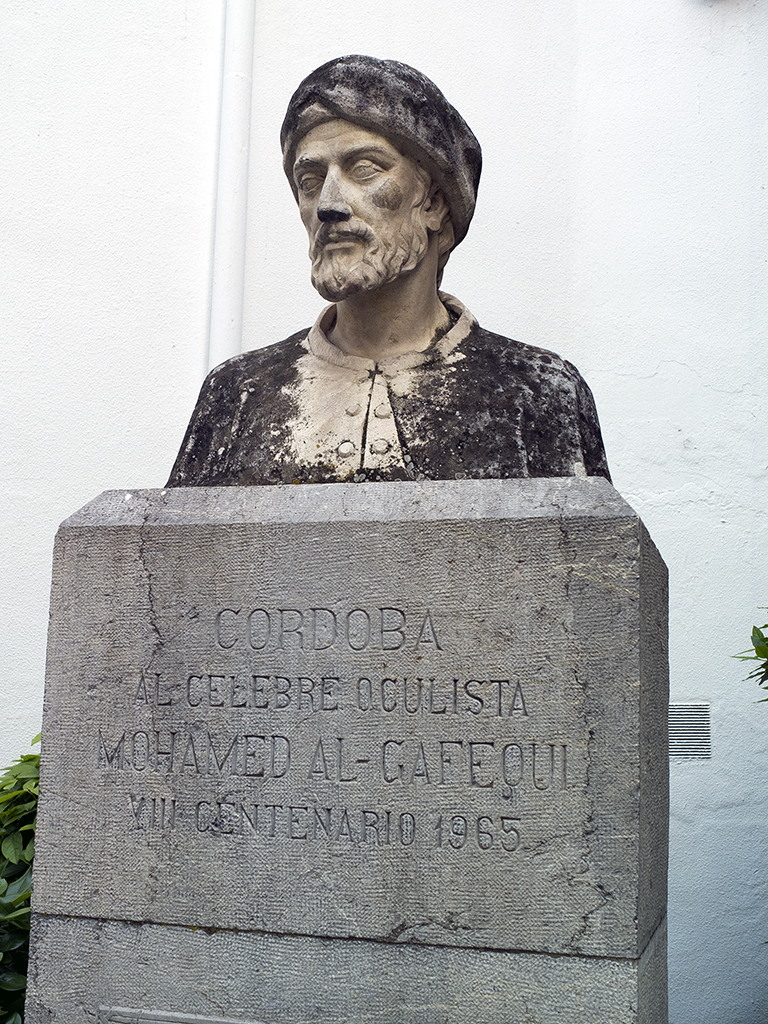 Busto dedicado al oculista andalusí Muhammad Ibn Qassoum Ibn Aslam Al-Gafequi (Mohamed Al-Gafequi) en la ciudad de Córdoba (España); se encuentra situado frente a la Facultad de Filosofía y Letras de la mencionada ciudad.